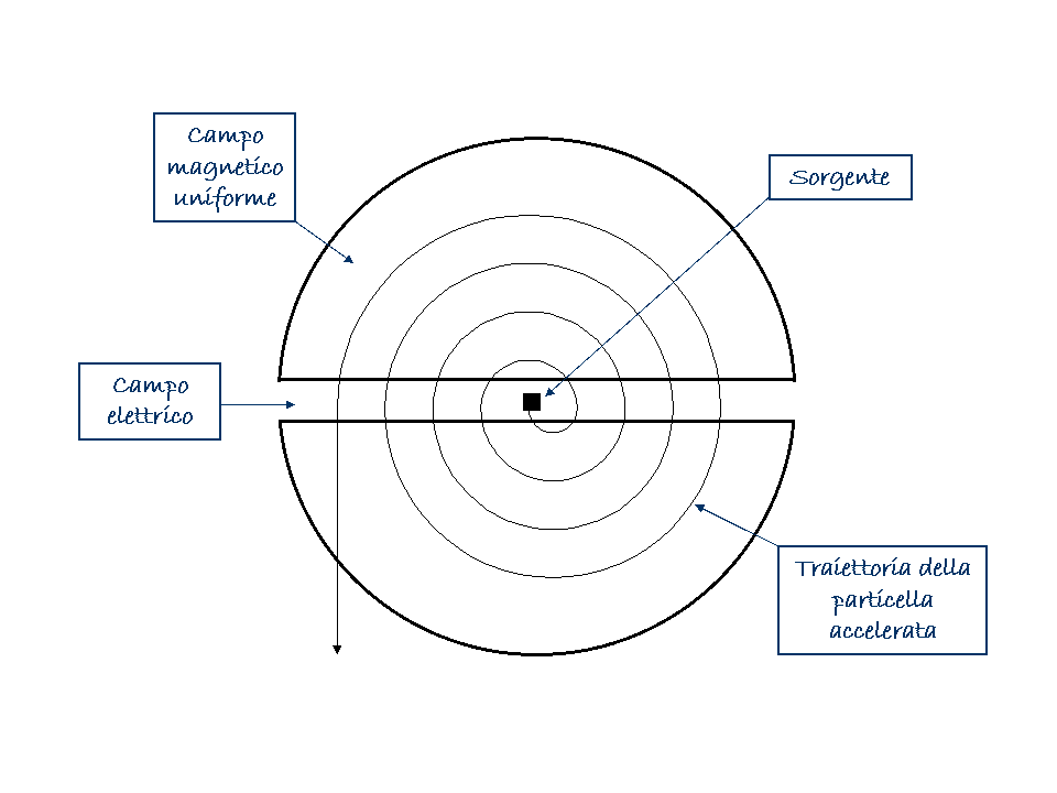 Schema di un ciclotrone, il primo esempio di acceleratore circolare ideato da Lawrence nel 1930.